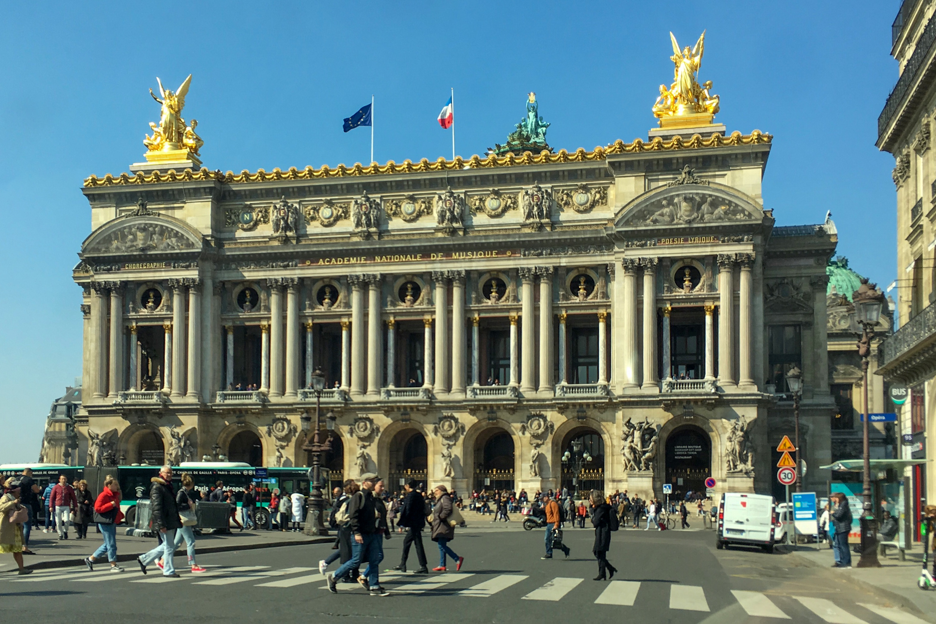 Outside view of the Opera